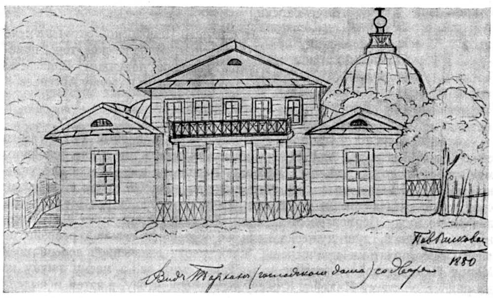 View from the house in Tarkhany from the yard. Figure Viskovatov P. 1880